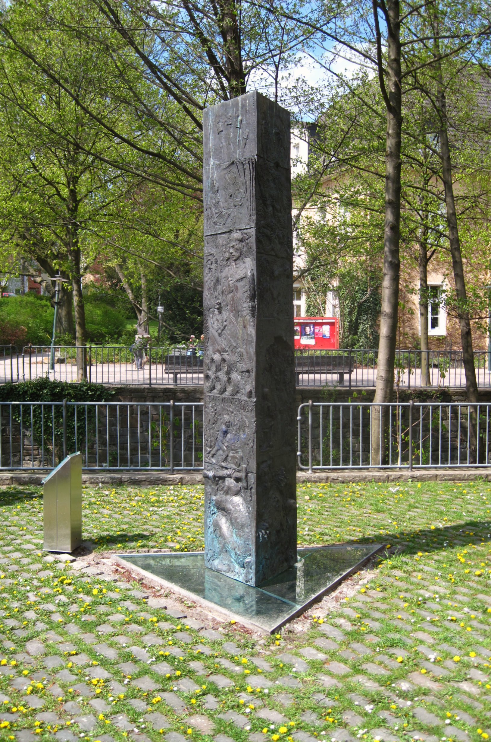 Bilderstele Aus der Tiefe (Bronze) vor dem Geschäftshaus Hauptstraße 174 in Hemer, Erschaffen 1993 durch die Künstlerin Ulle Hees aus Wuppertal.